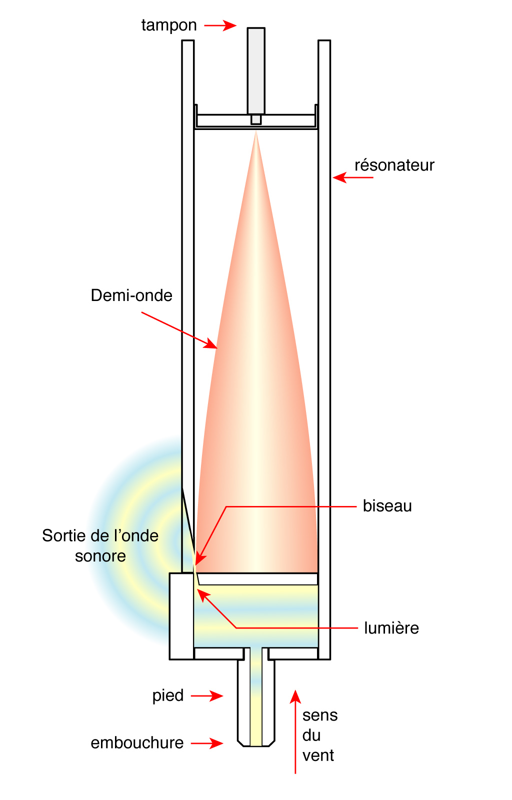 Schéma du parcourt de l'air et de la génération de l'onde sonore dans un tuyau de bourdon (jeu d'orgue)